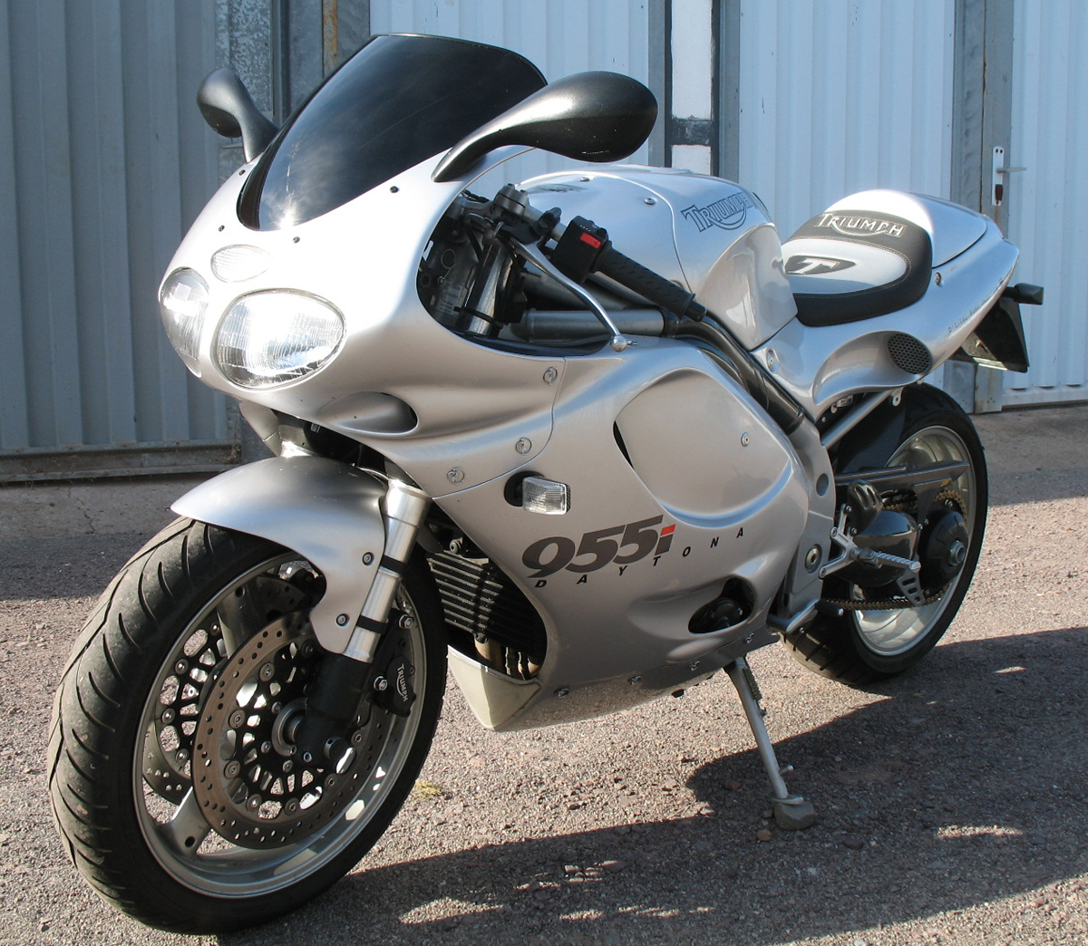 Triumph Daytona 955i, Baujahr 2000